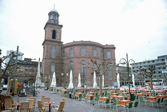 Paulskirche - Frankfurt